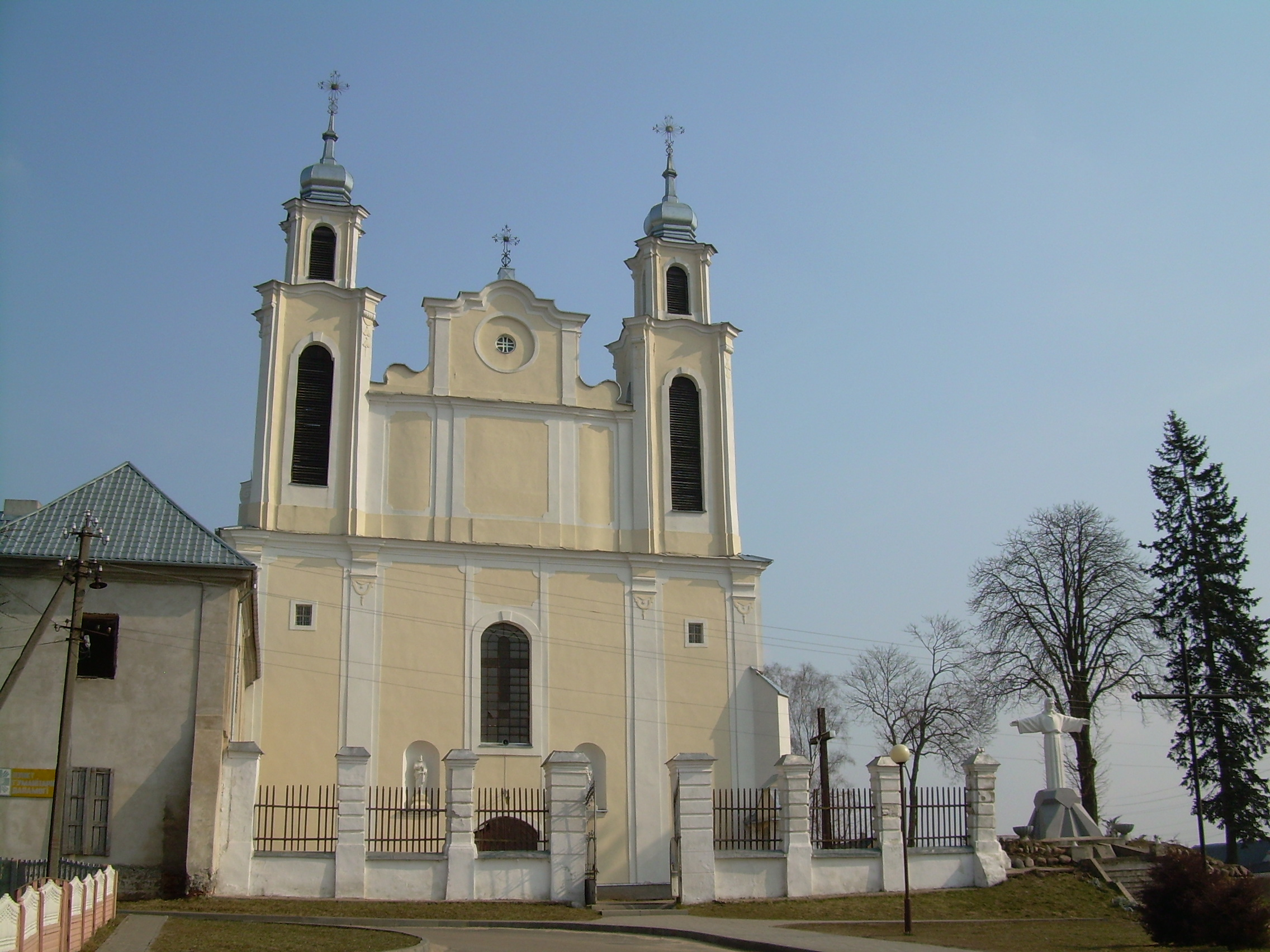 Беларуская (тарашкевіца): Ансамбаль былога кляштару бэрнардынцаў:Петрапаўлаўскі касьцёл, галоўны алтар касьцёлу, былы жылы корпус, агароджа. г. Іўе This is a photo of Belarusian heritage monument. Reference number: 412Г000286 ( WLM)